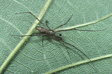 male Moneta tanikawai from Okinawa.